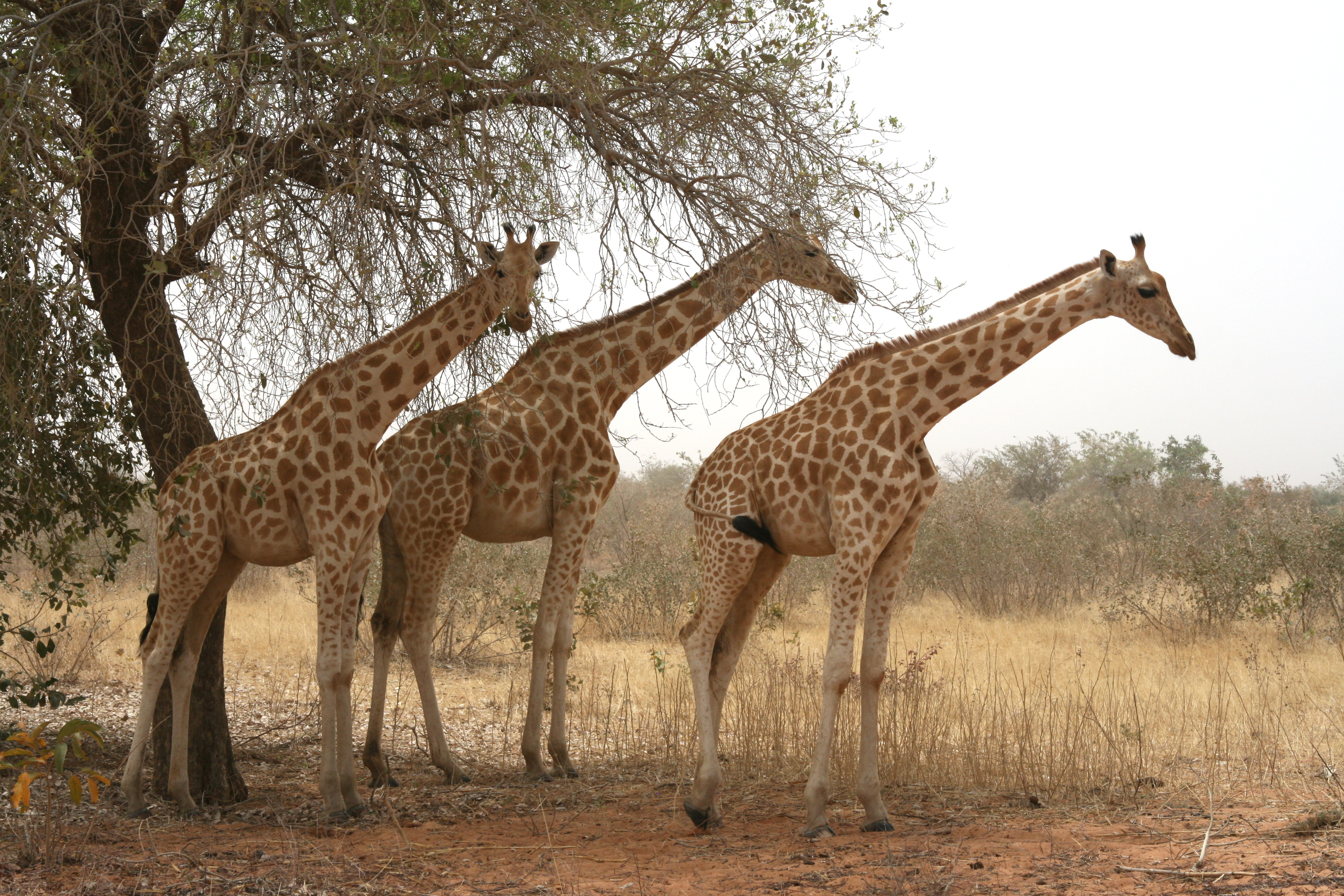 Die letzten freilebenden Giraffen Westafrikas.